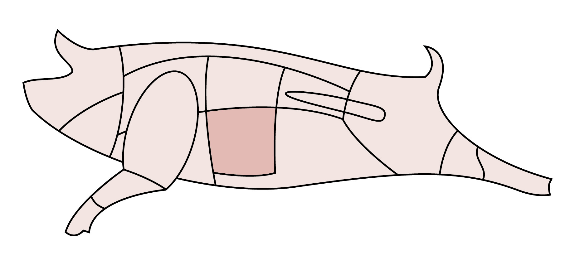 Schematische Darstellung eines Schweins, Bauchfleisch.